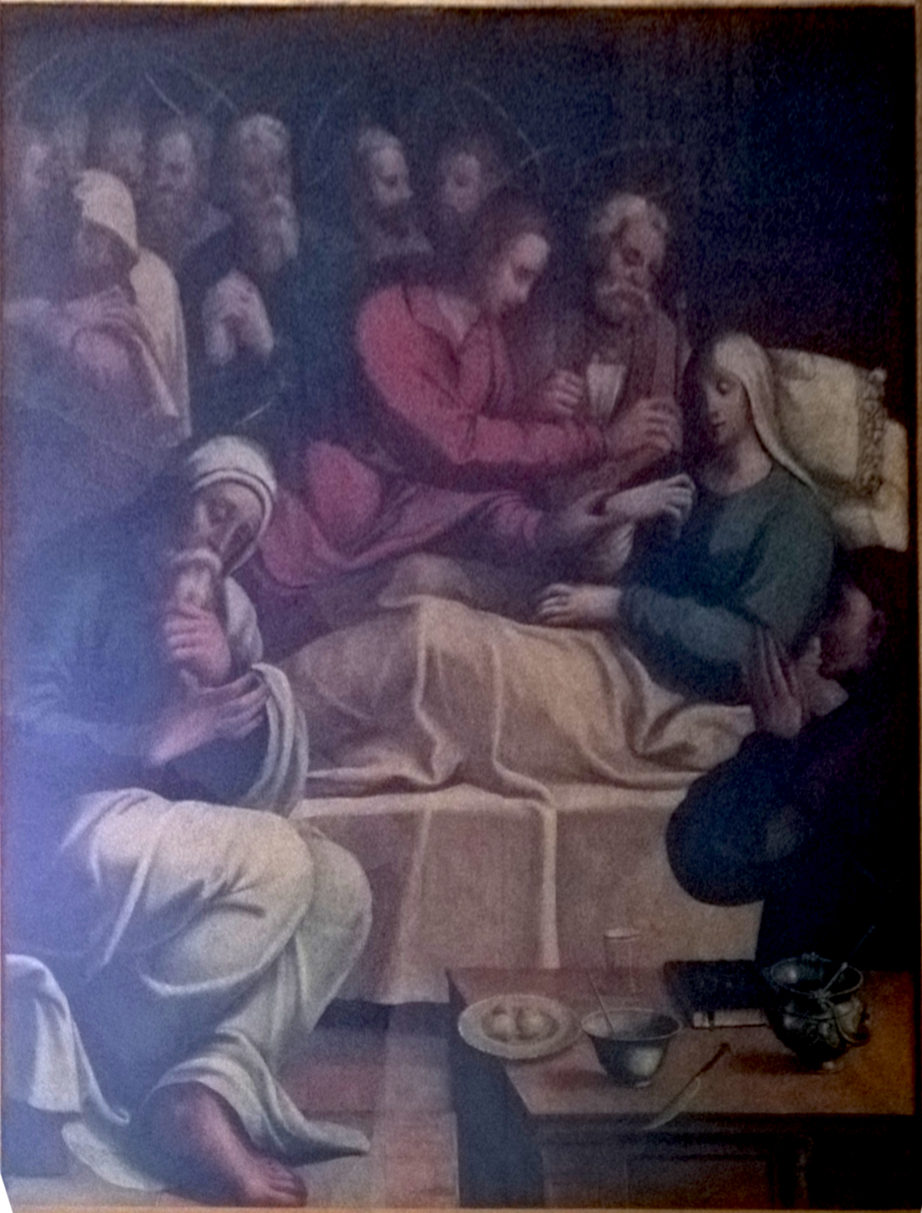 Pintura a óleo sobre tela "Morte da Virgem Maria" do Mestre de Arruda dos Vinhos, integrante do Políptico quinhentista da Matriz de Arruda dos Vinhos, de cerca de 1550